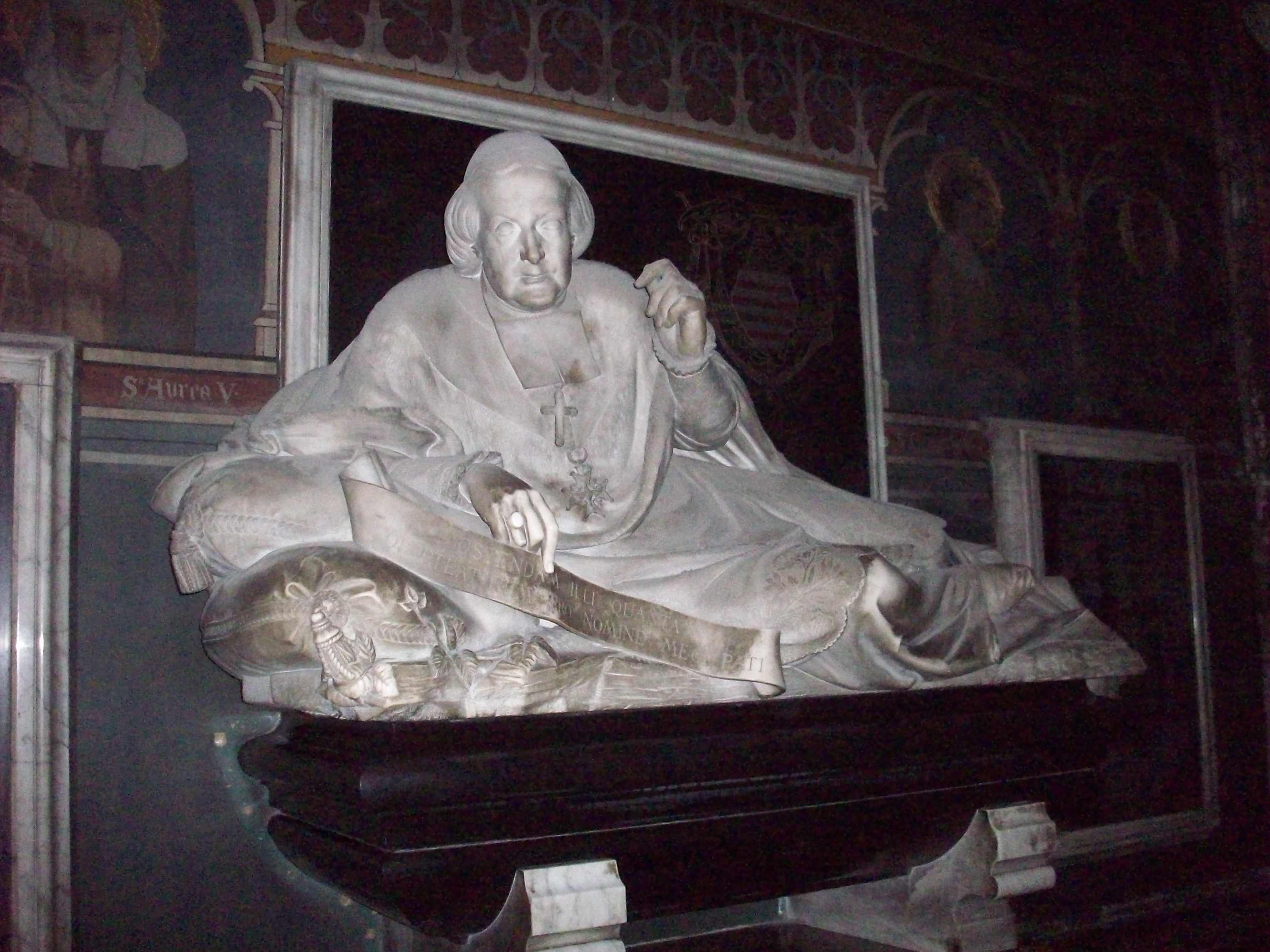 Gisant de Hyacinthe-Louis de Quélen (1778-1839), archevêque de Paris